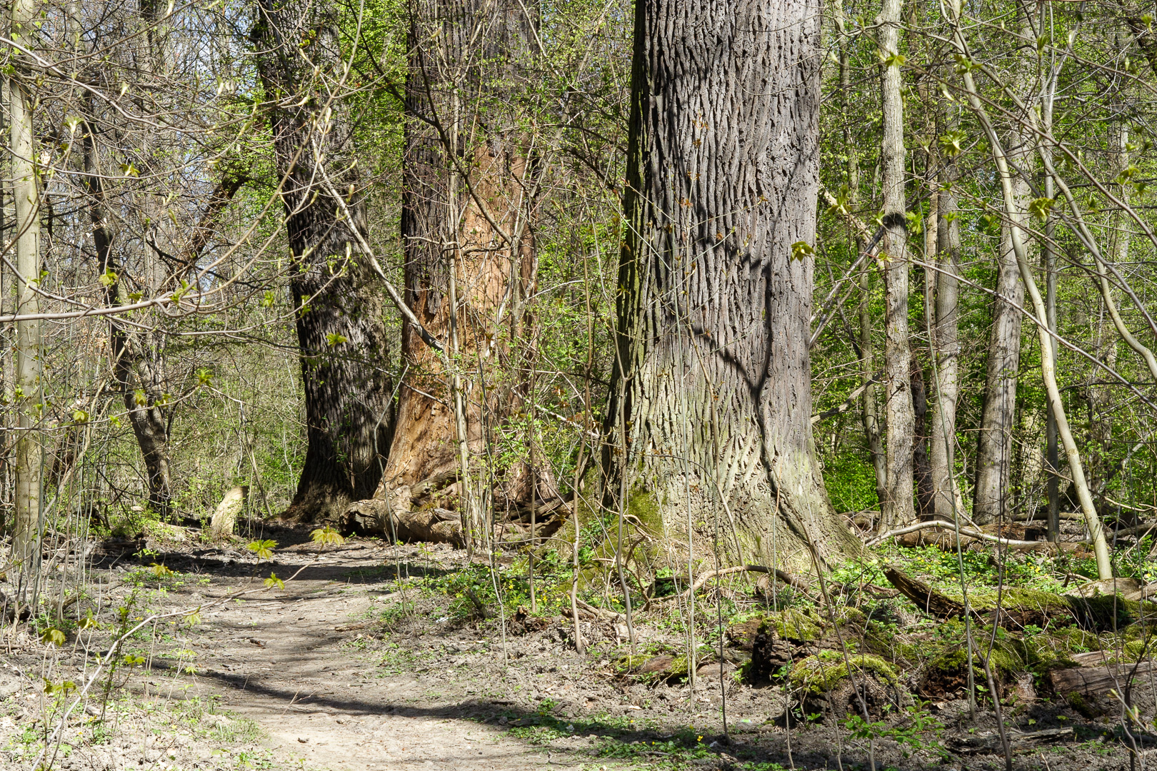 Lasek Bielański - alejka spacerowa. This is a photography of Natura 2000 protected area with ID PLH140041